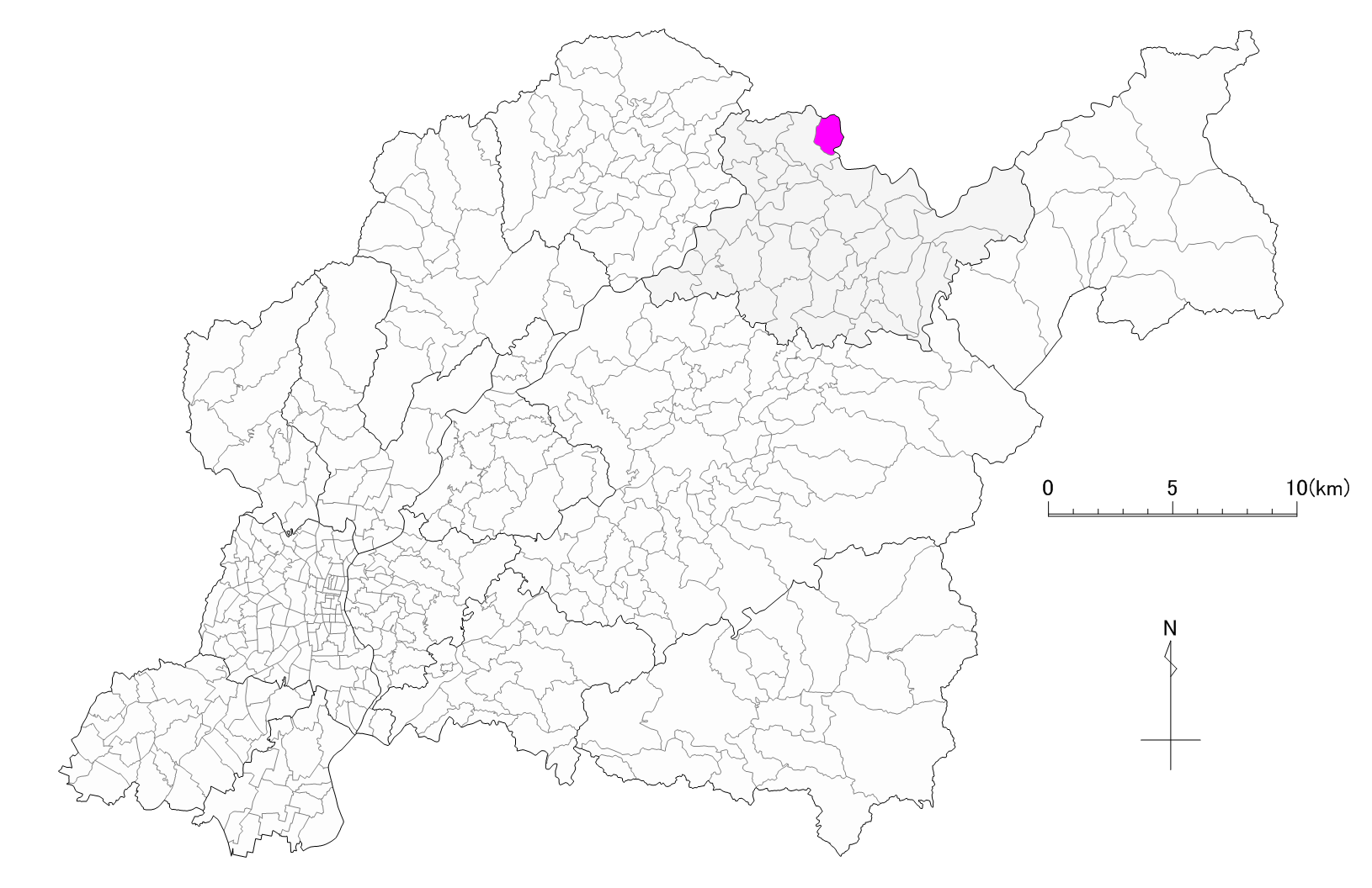 豊田市須渕町位置図